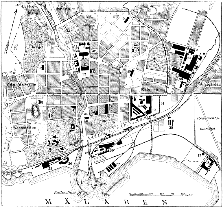 Karta över Västerås vid 1900-talets början (senast 1922)Situationsplan af Västerås. 1. Västerås slott. – 2. Västerås domkyrka. – 3. Biskopshus. – 4. Domprosthus. – 5. Konsistorium. – 6. Högre allmänt läroverk. – 7. Bibliotek. – 8. Elementarläroverk för flickor. – 9. Folkskolor. – 10. Teknisk skola. – 11. Rådhus. – 12. Stadshus med stadshotell. – 13. Riksbanks-, post-och telegrafhus. – 14. Teater. – 15. Polis- och brandstation. – 16. Gasverk och elektricitetsverk. – 17. Gasklocka. – 18. Statens ångkraftstation. – 19. Länslasarett. – 20. Epidemisjukhus. – 21. Varmbadhus. – 22. Länscell-fängelse. – 23. Tullhus. – 24. Järnvägsstation. – 25. Järnvägsverkstad. – 26. Lokomotivstall. – 27. Stadens magasin. – 28. Renhållningsverk. – 29. Folkets hus. – 30. Allmänna svenska elektriska a.-b. ("Asea"). – 31. A.-b. Svenska metallverken – 32. Stortorget. – 33. Fiskartorget. – 34. Kreaturstorget. – 35. Stadsparken. – 36. Vasaparken. – 37. Slottsparken. – 38. Slottsträdgården. – 39. Länsträdgården. – 40. Stallhagsparken. – 41. Mariaberget. – 42. Botanisk trädgård. – 43. Gamla begrafningsplatsen. – 44. Nya kyrkogården. – 45. A.-b. Svenska metallverkens arbetarbostäder.